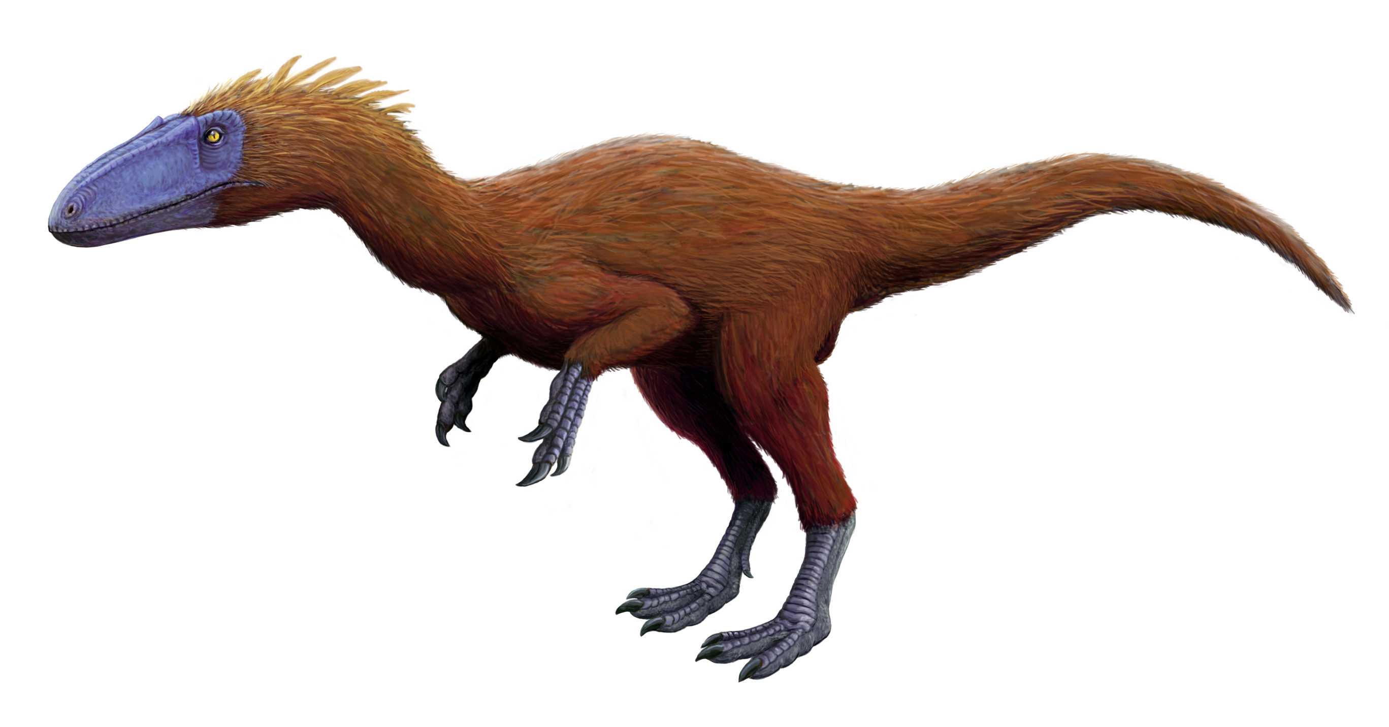 Zuolong salleei.